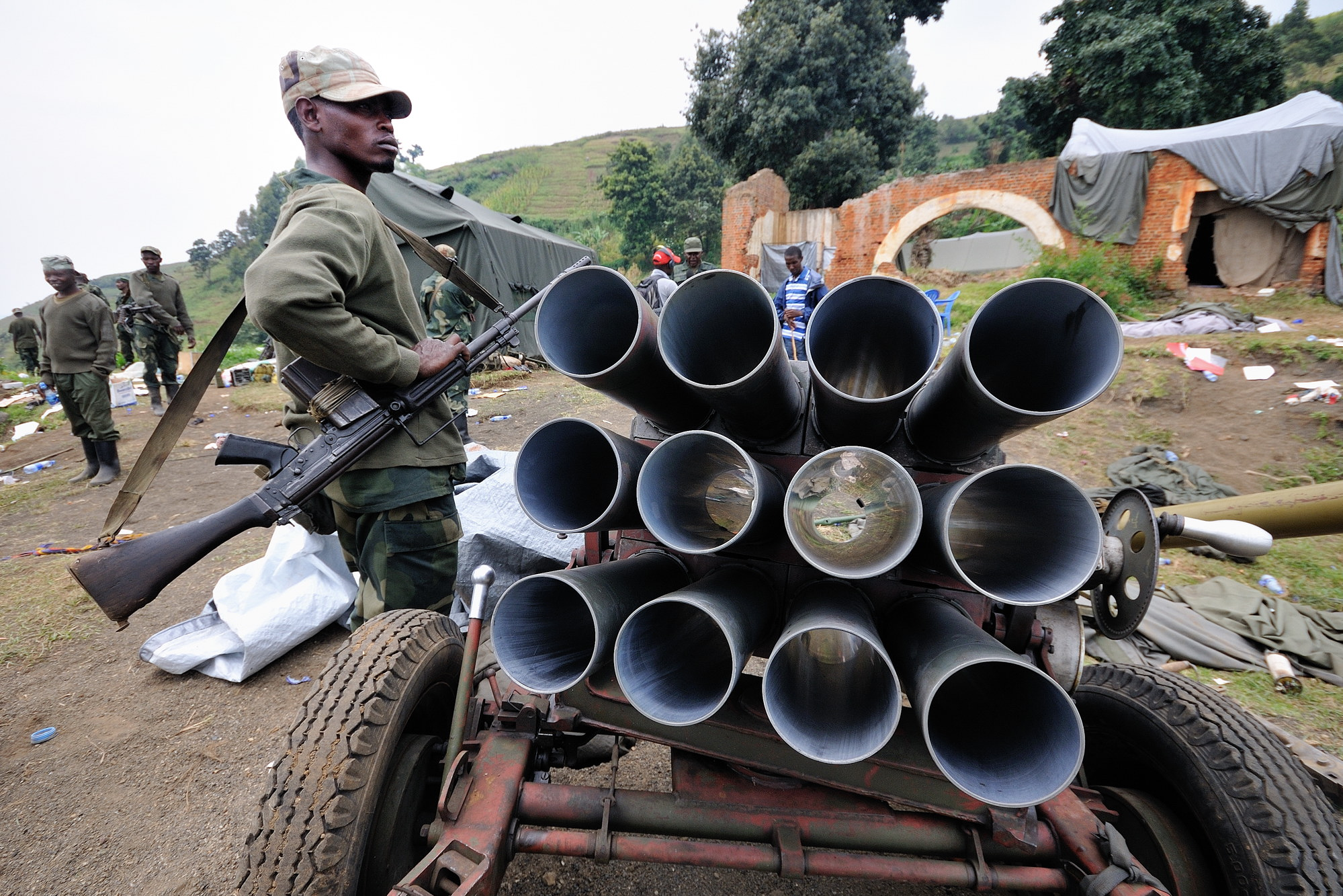 Artillería de cohetes del movimiento rebelde congoleño M23.